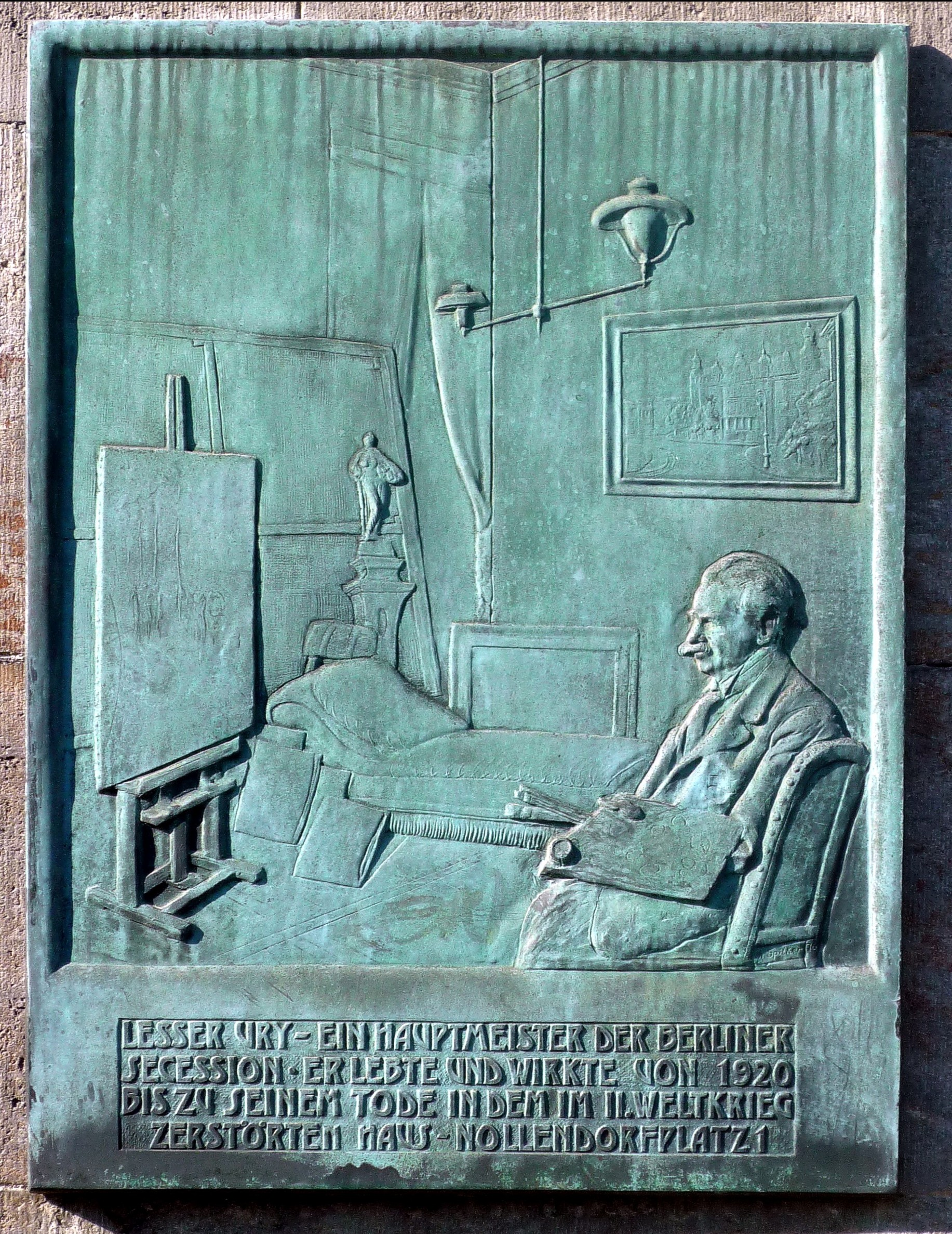 Gedenktafel für den Maler Lesser Ury am U-Bahnhof Nollendorfplatz, Berlin.